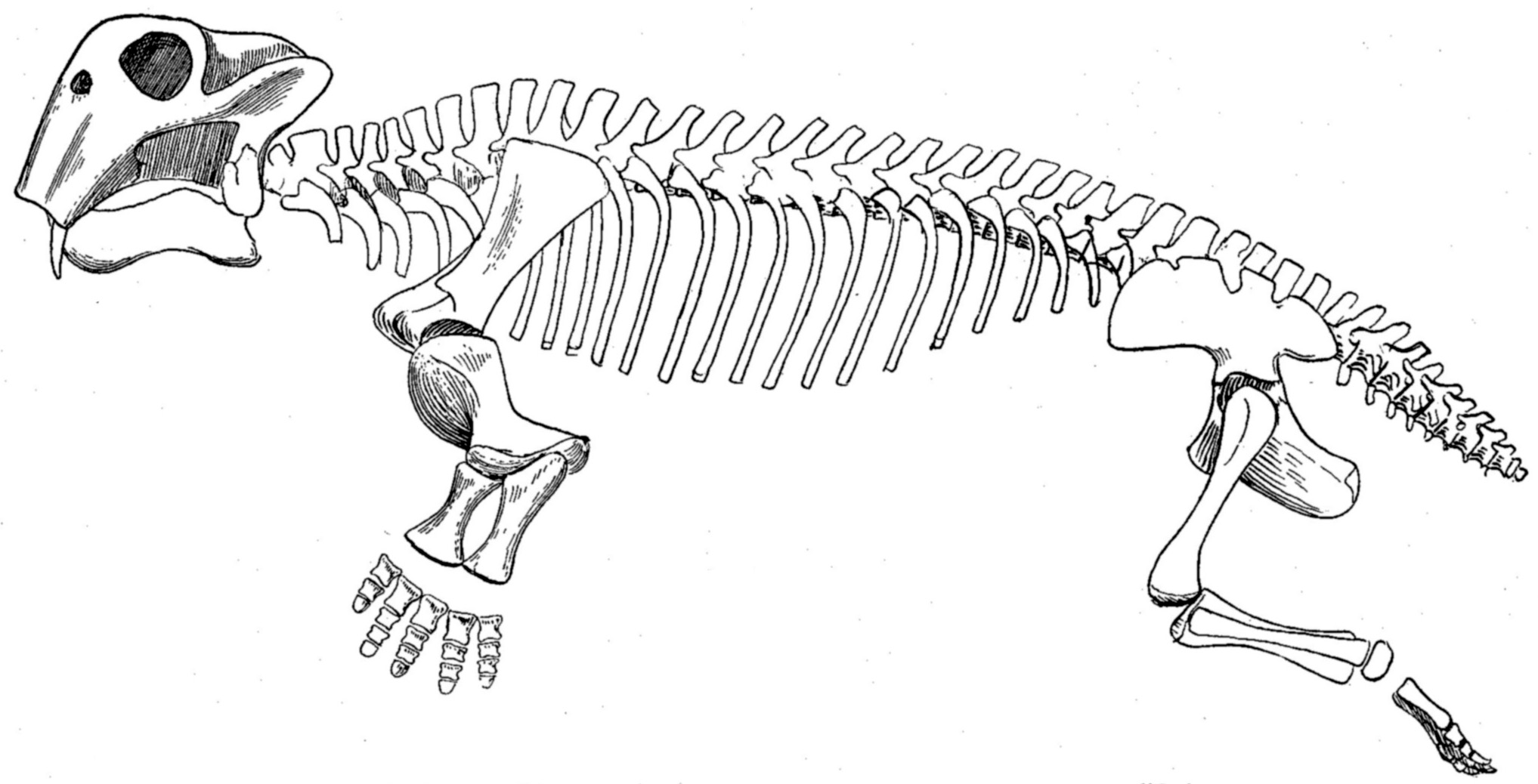 Lystrosaurus skeleton